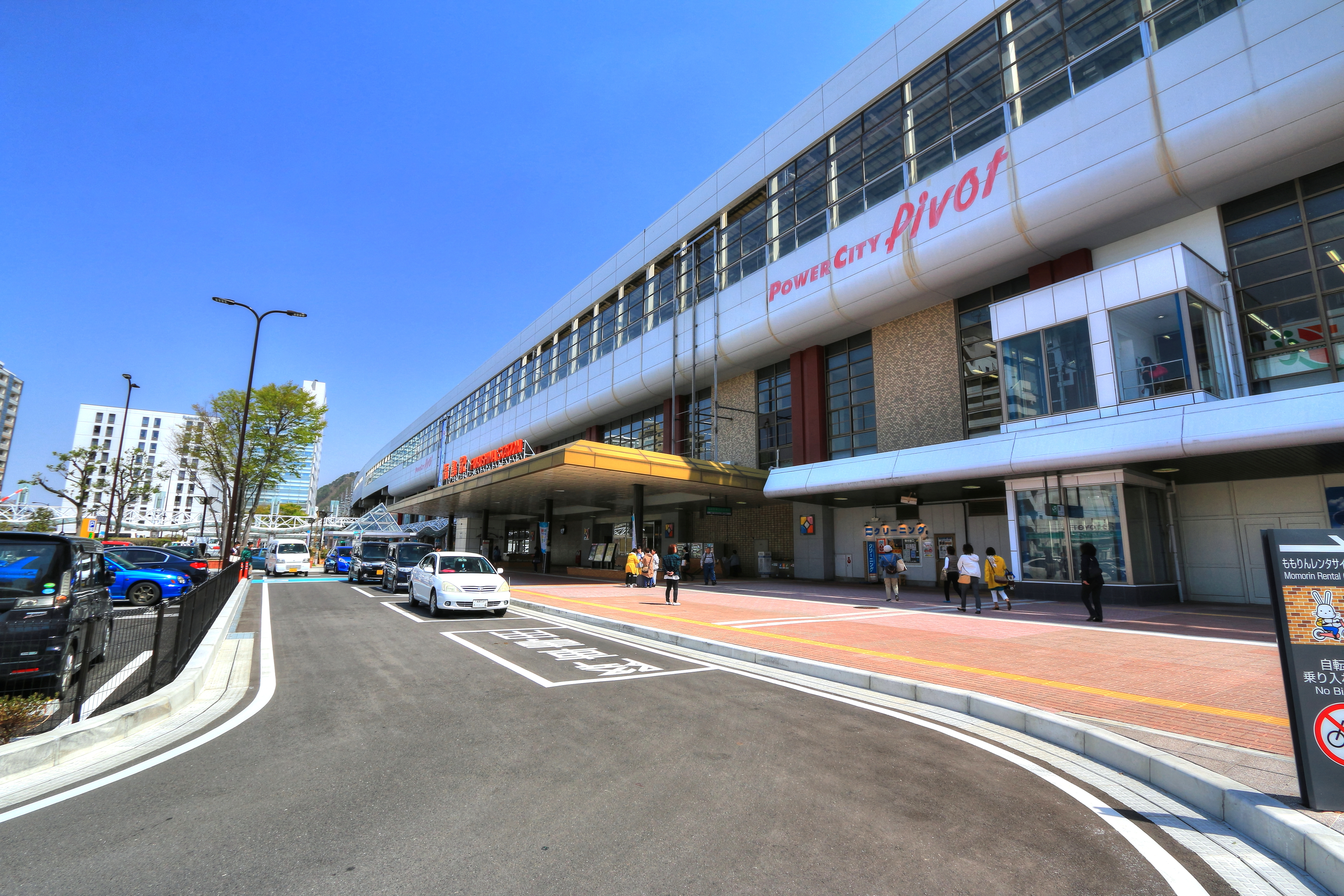 福島駅